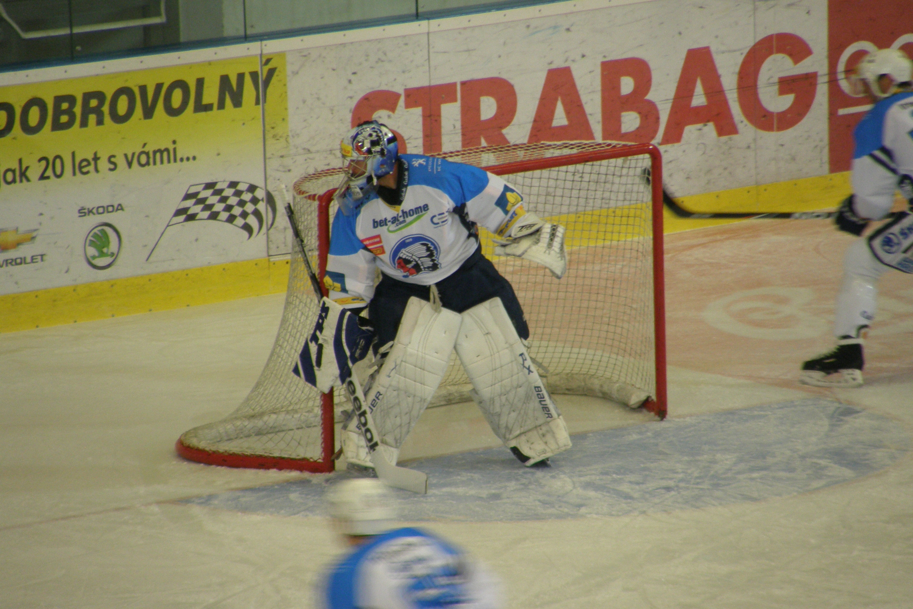 Adamov Svoboda v zápase Plzeň proti Brnu, Kajot Aréna (6.12.2011)